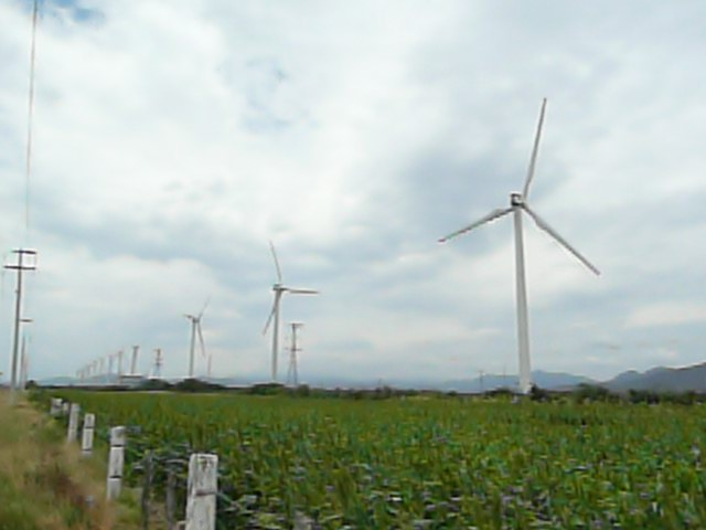 En "La Ventosa" Oaxaca, generadores de energia eolica.